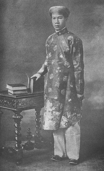 阮福晪